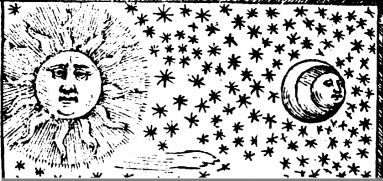 Simboli del Sole e della Luna utilizzati all'interno della traduzione del trattato di Joannes de SacroBosco del 1230, intitolata Sphera volgare novamente tradotta; sottotitolo: con molte notande additioni di geometria, cosmographia, arte navicatoria, et stereometria, proportioni, et qvantita delli elementi, distanze, grandeze, et movimenti di tvtti li corpi celesti, cose certamente rade et maravigliose, stampato a Venezia, per Bartholomeo Zanetti, «anno salutis nostre M. D. XXXVII. mense Ottobri, &c. [Oct. 1537]»